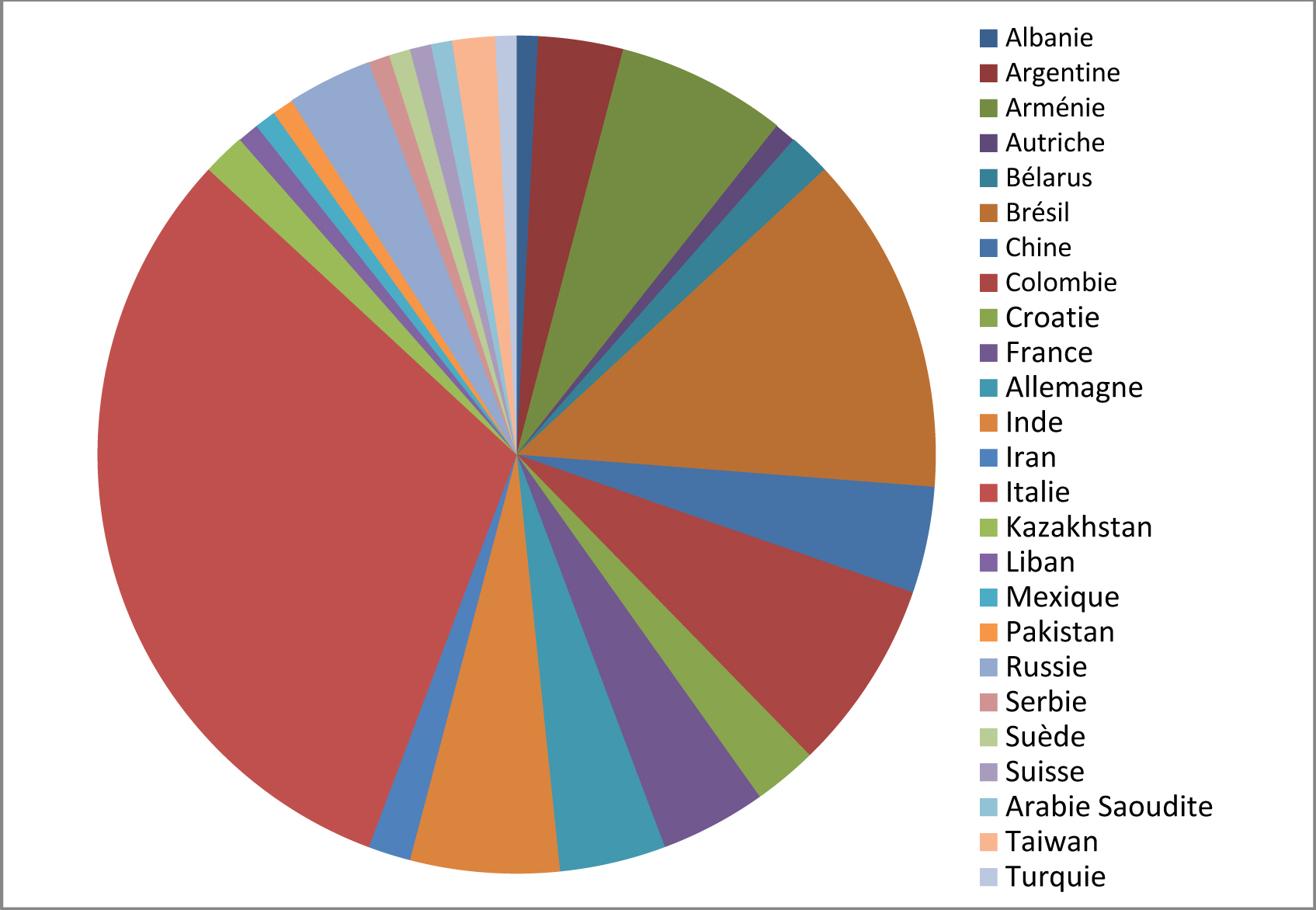 La distribution géographique des étudiants de l’IRAP PhD.